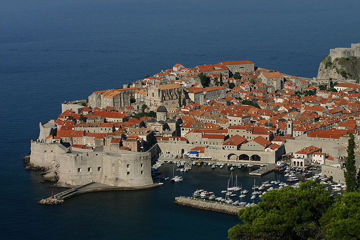 Croatia Dubrovnik